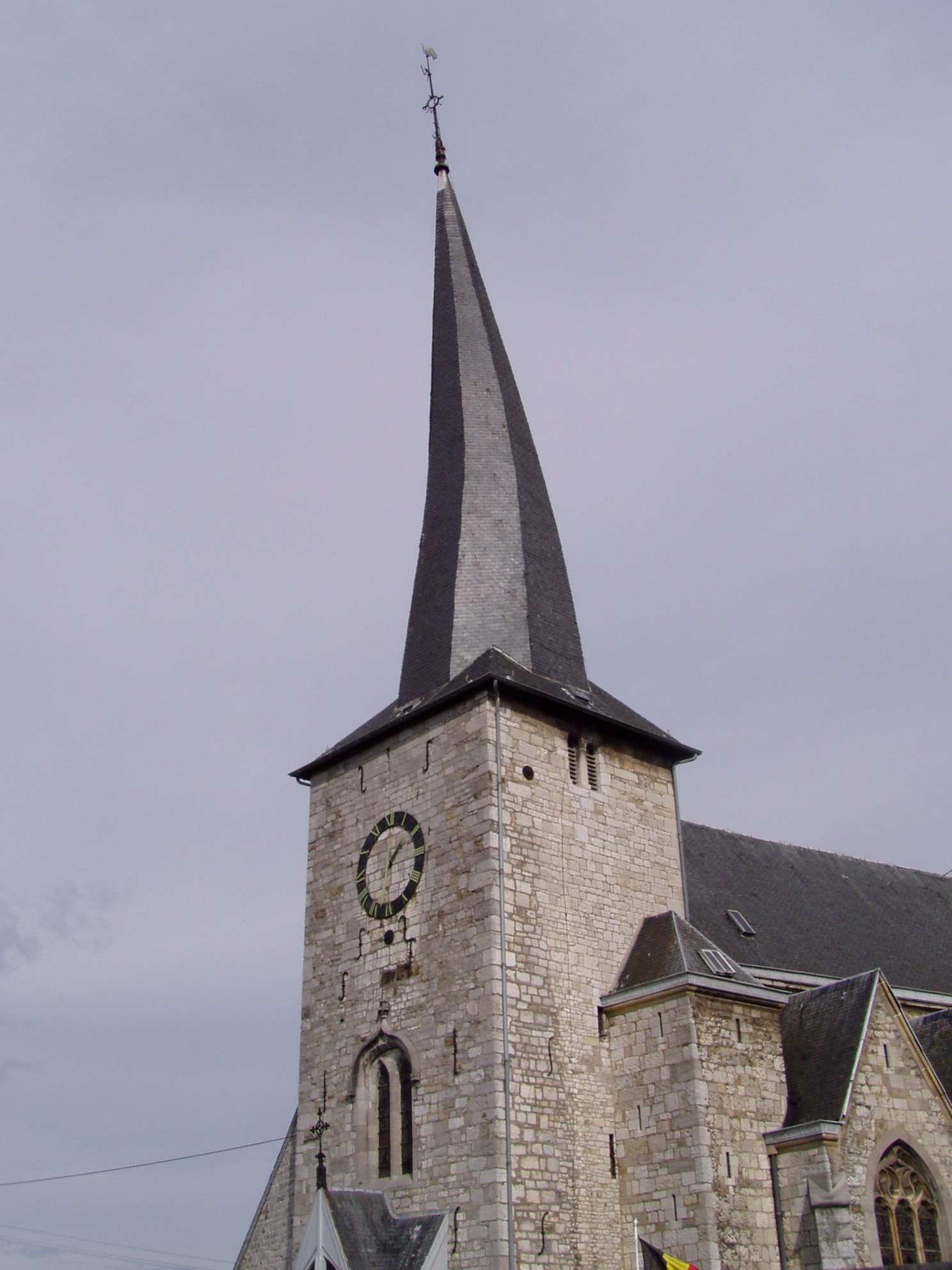 photographie du clocher tors de l'église de Goé (commune de Limbourg) (Belgique), prise par Accrochoc, le 1er octobre 2006.